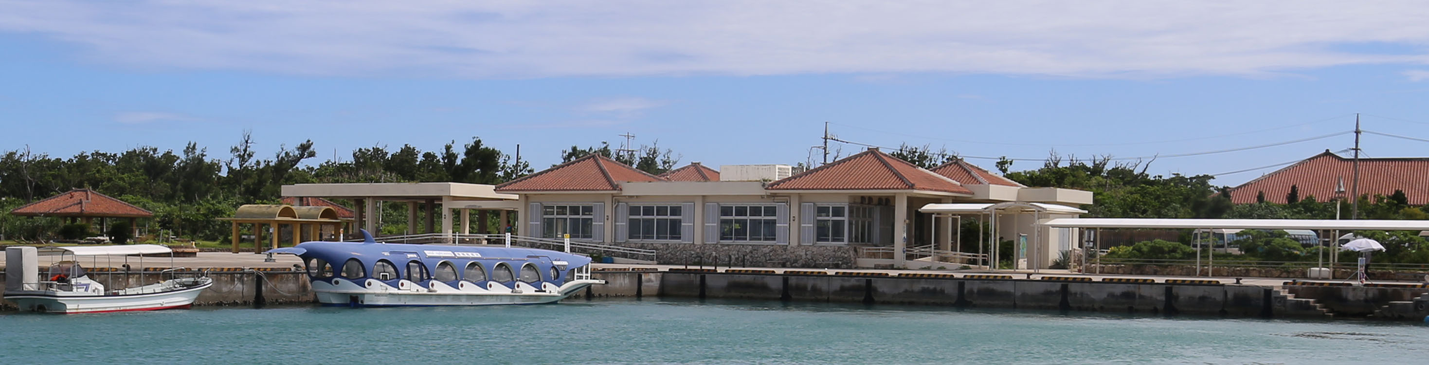 竹富港の風景